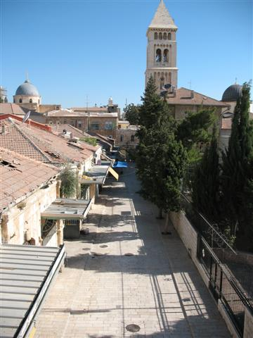 muristan jerusalem